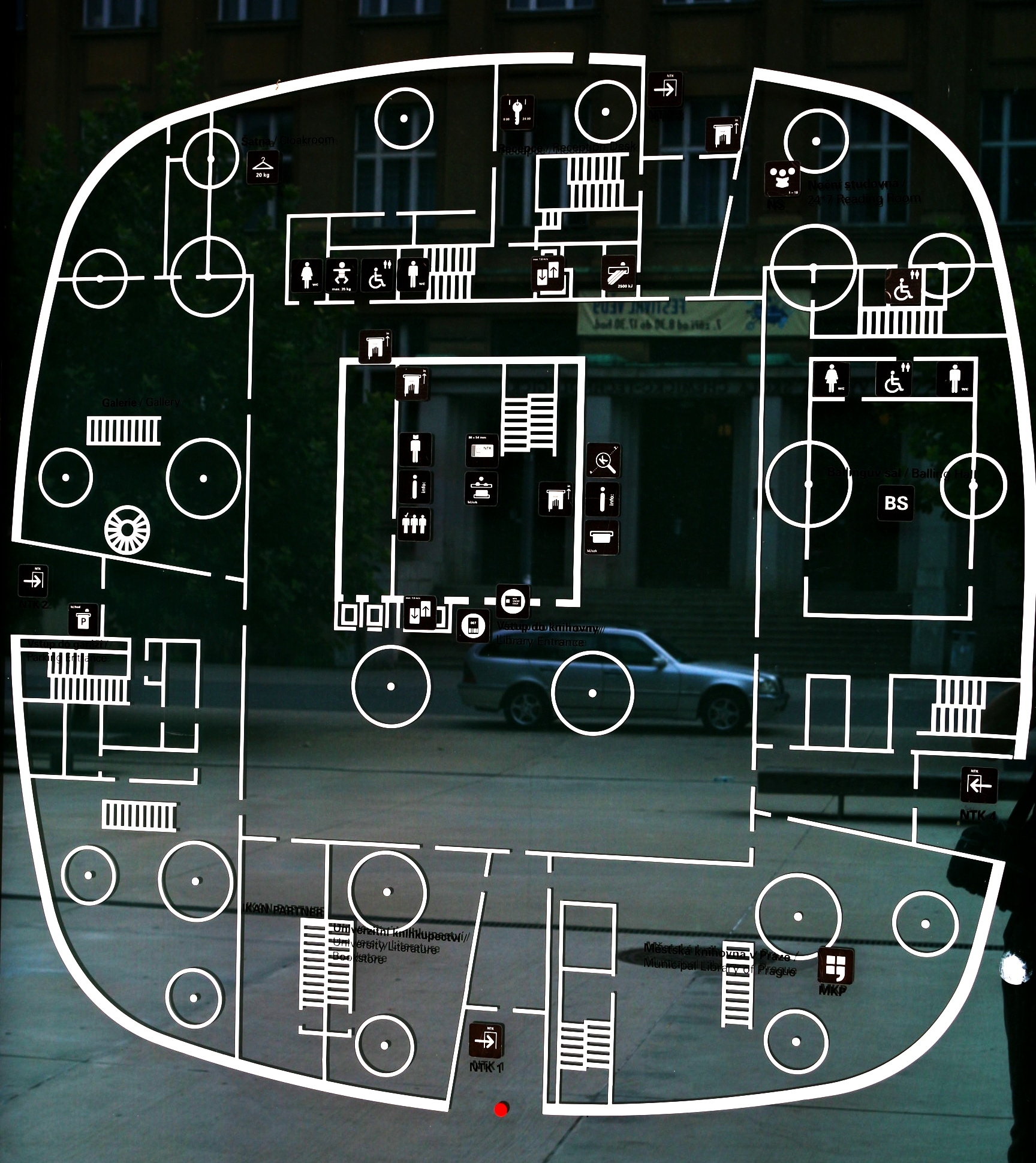 Česká národní technická knihovna v Dejvicích